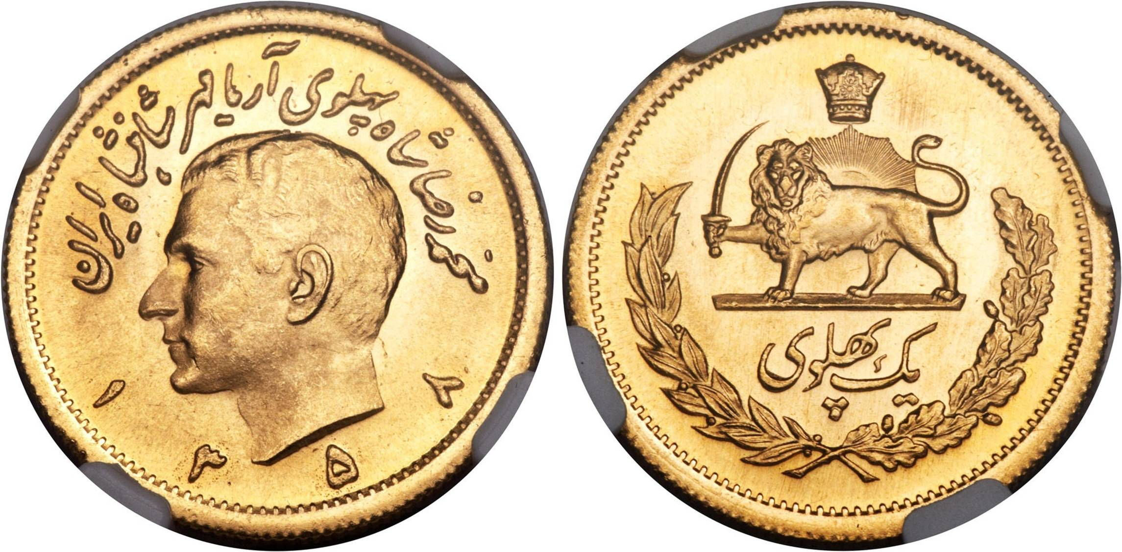 آخرین سکه یک پهلوی که در سال 1357 اما با تاریخ 1358 ضرب گردیده است.